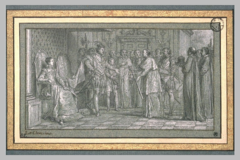 Heinrich II., König von Frankreich, empfängt ein geweihtes Schwert. Schwarze Kreide, weiß gehöht, auf blauem Papier 7,4 × 13,5 cm Louvre, Paris